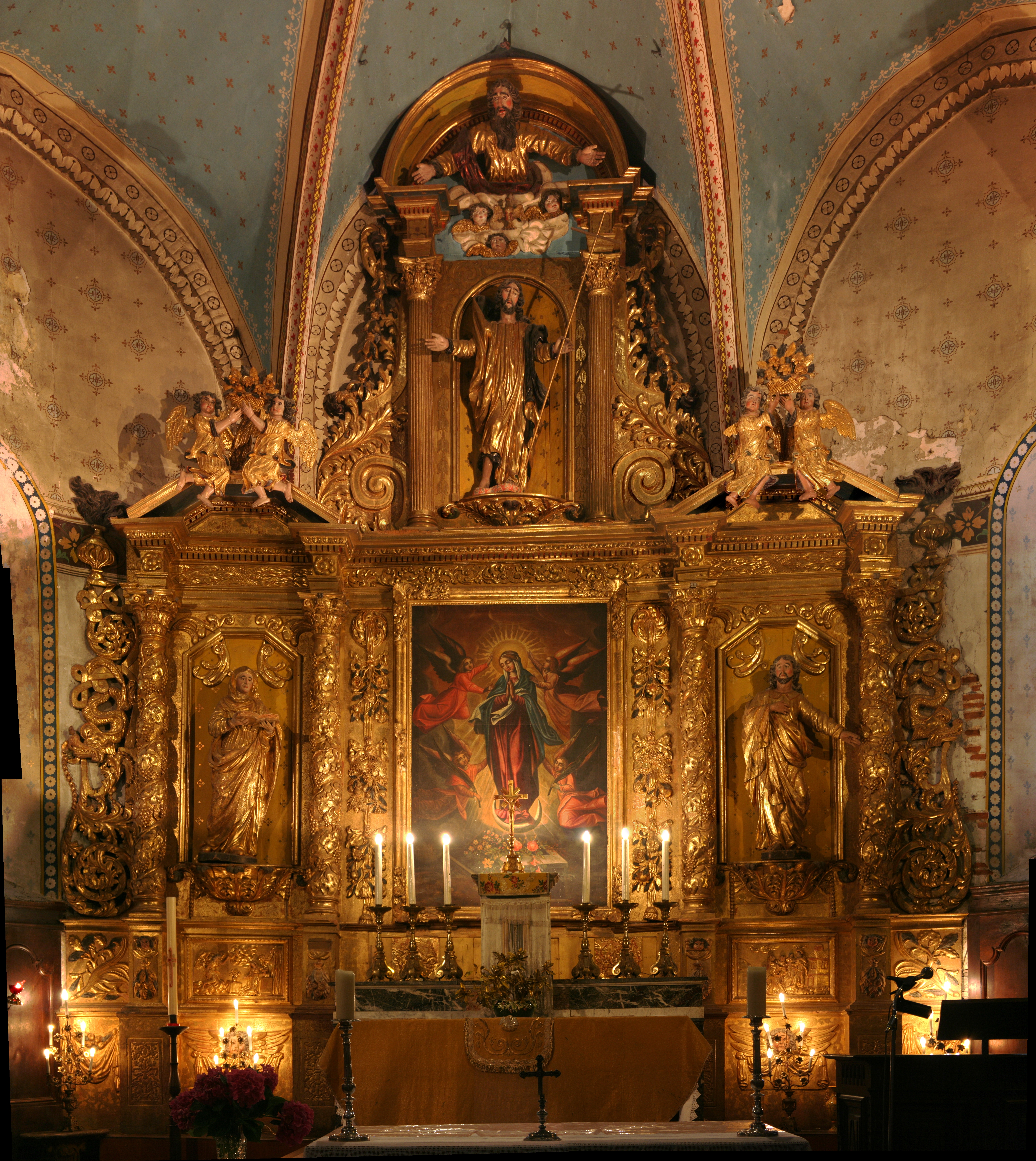 Photomosaïque redressée (8 clichés) prise en lumière d'origine du retable en bois de l'église de Rabat les Trois Seigneurs en Ariège